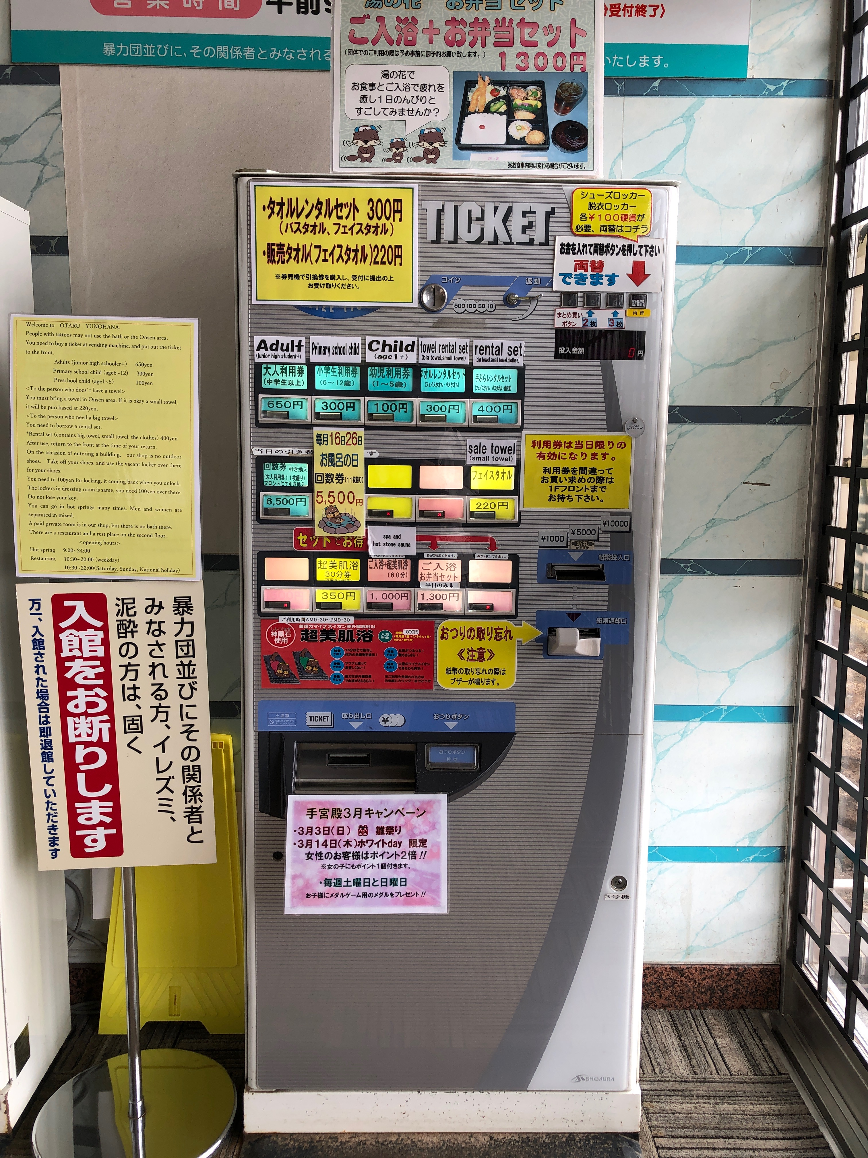 湯の花